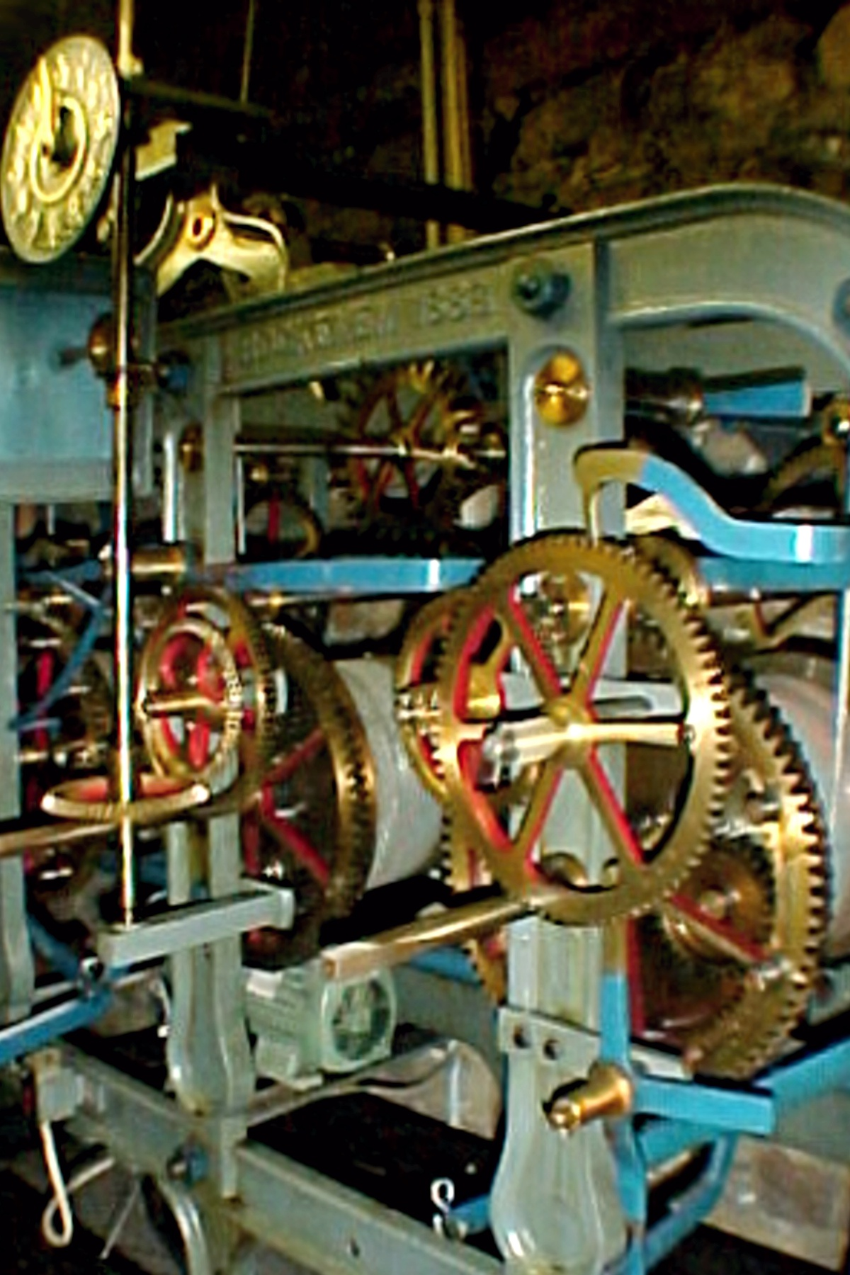 Turmuhr, Baujahr 1888, von J. F. Weule, Bockenem, in der Reformationskirche Hilden